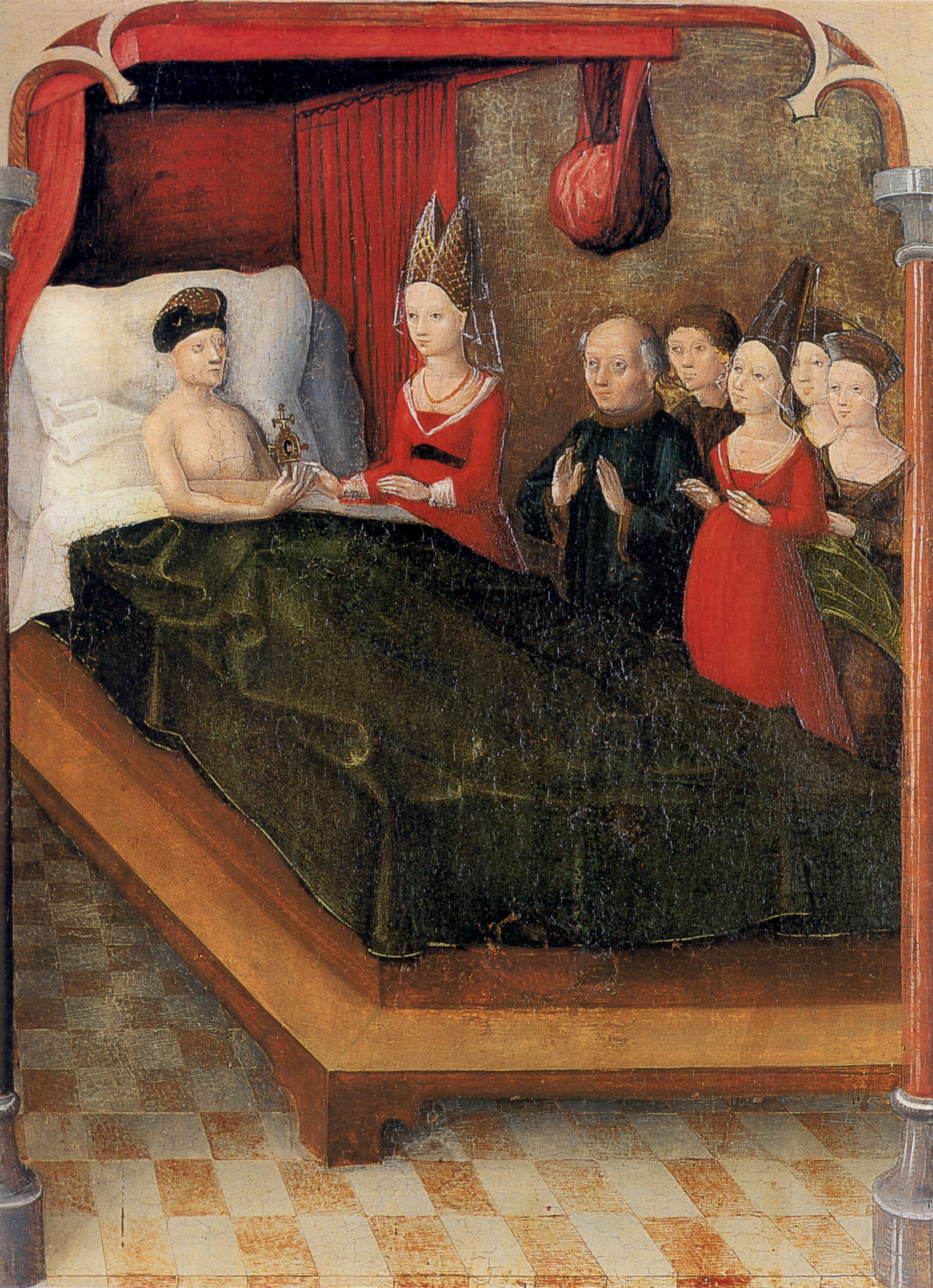 Weingartener Heilig-Blut-Tafel von 1489. Landesmuseum Württemberg, Stuttgart. Tafel 20: Bei seinem Tod vererbt Graf Balduin die Reliquie seiner Tochter Judith